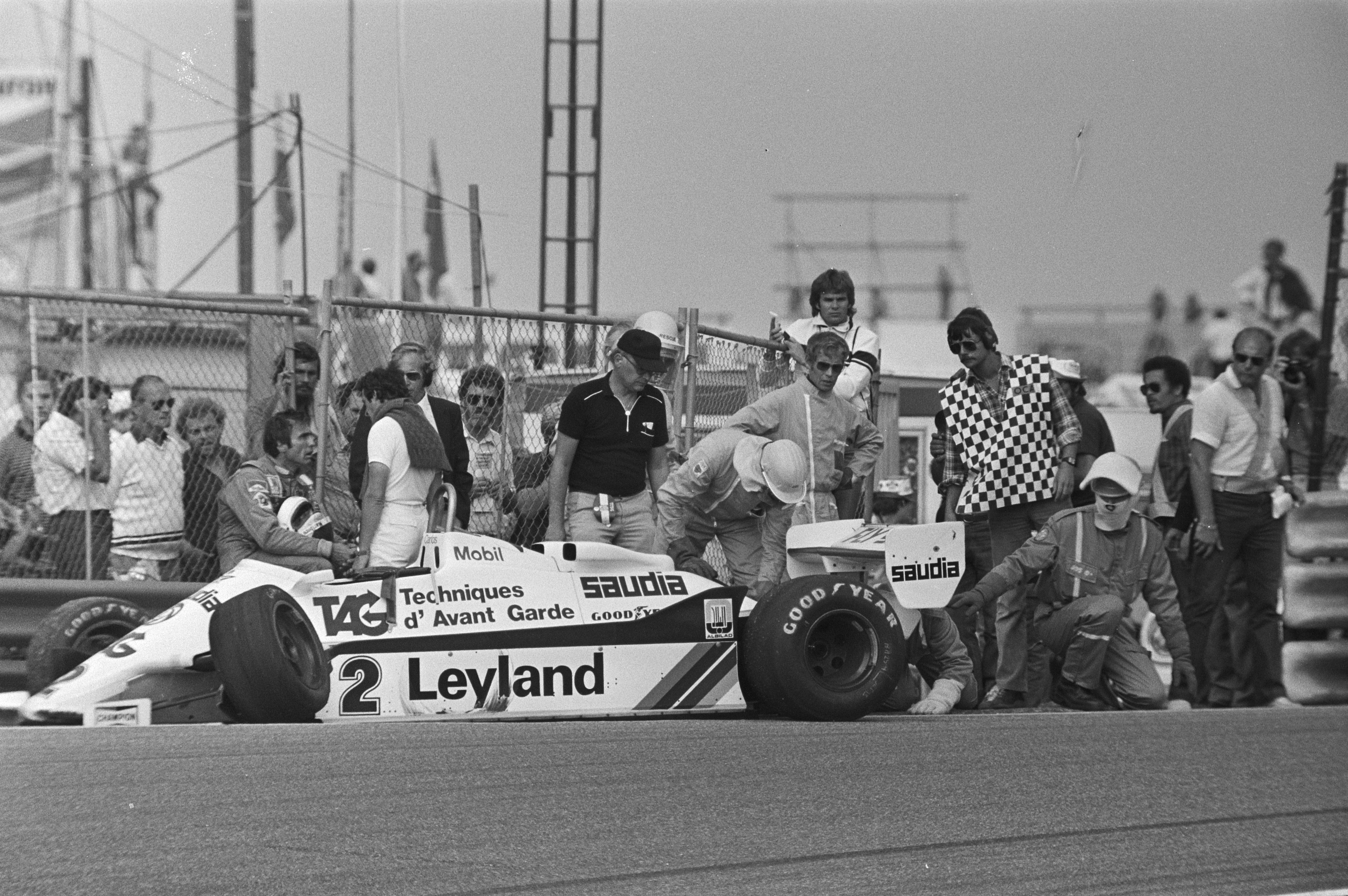 De Argentijnse autocoureur Carlos Reutemann (links) naast zijn Williams-Ford na een aanrijding tijdens de Grand Prix Formule 1 van Nederland, met de reddingsploeg van de OCA.